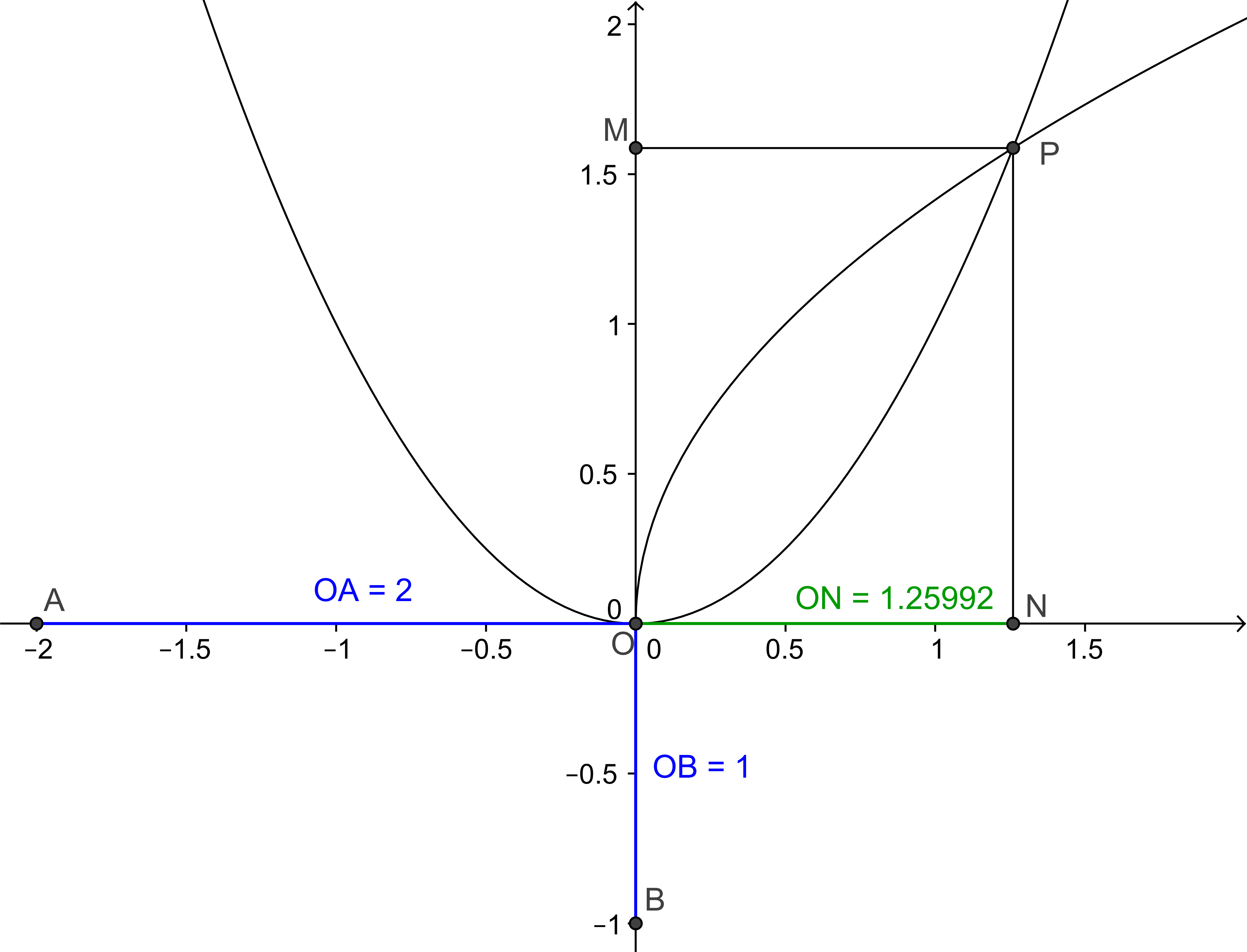 Duplicació del cub